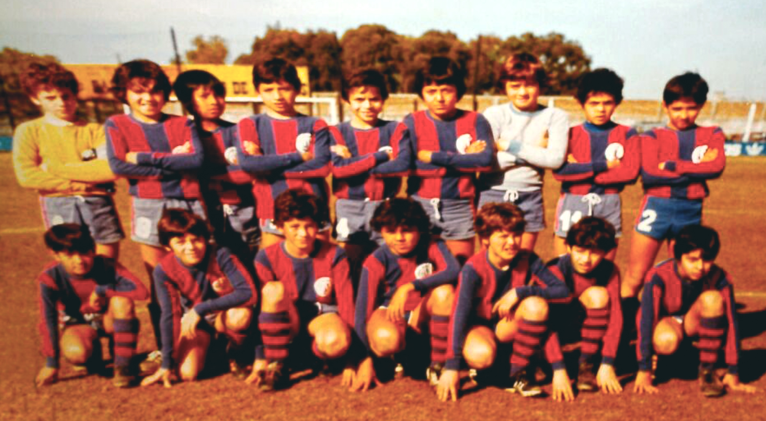 Messina en las inferiores de San Lorenzo de Almagro.